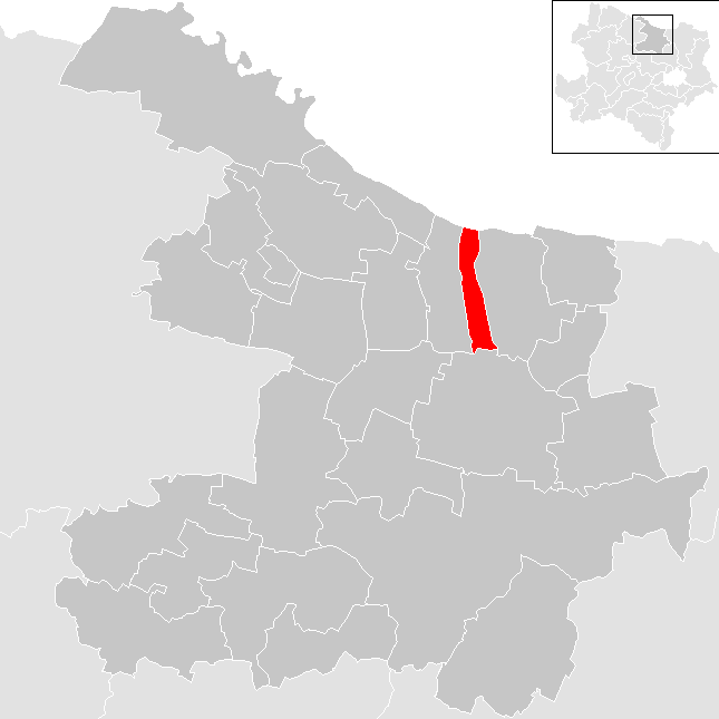 Bezirk Hollabrunn